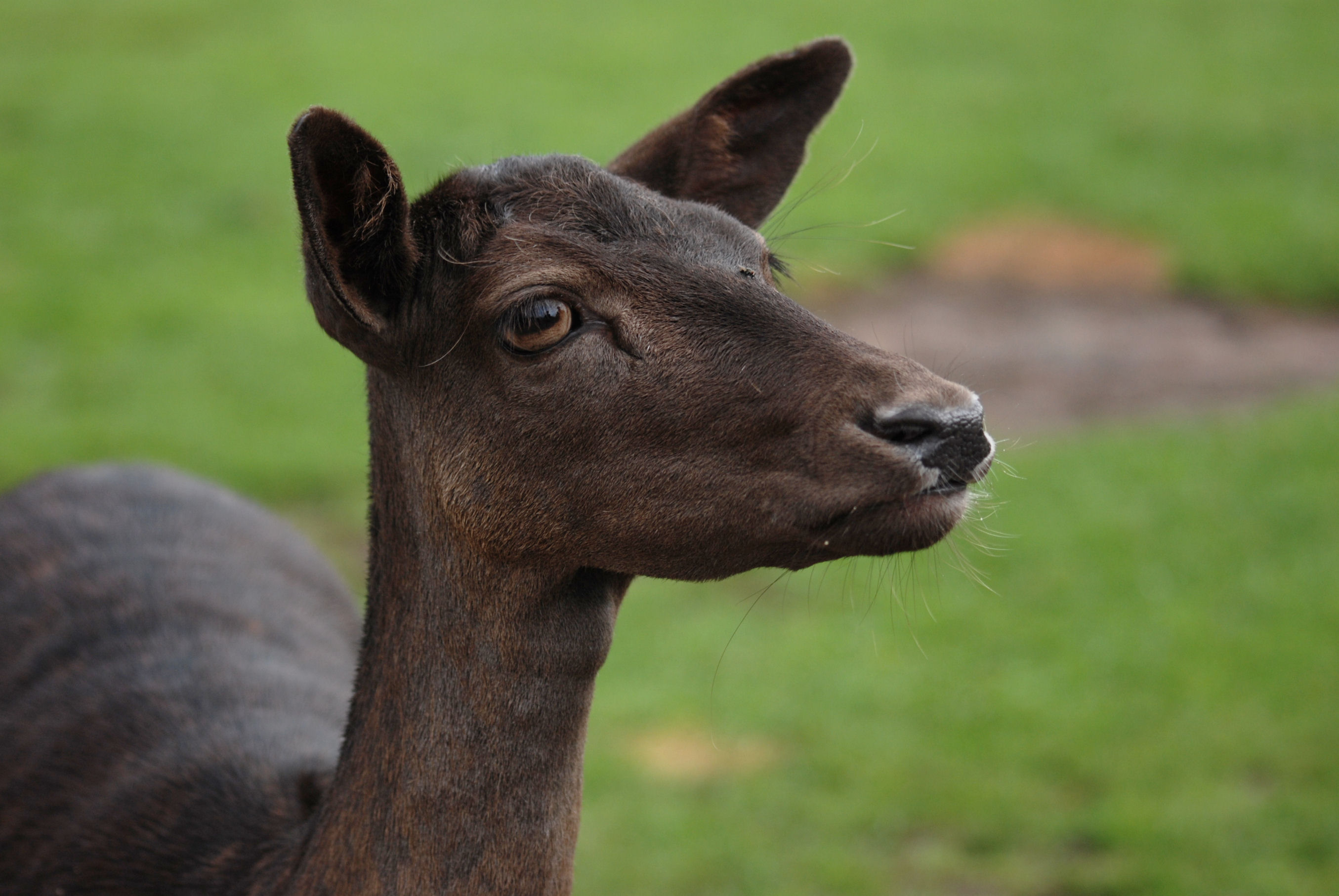 Dama dama in Kadzidłowo